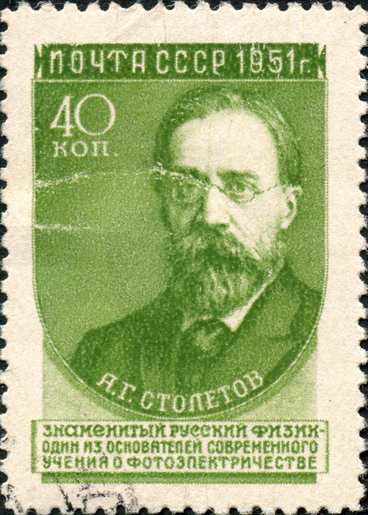 Марка СССР